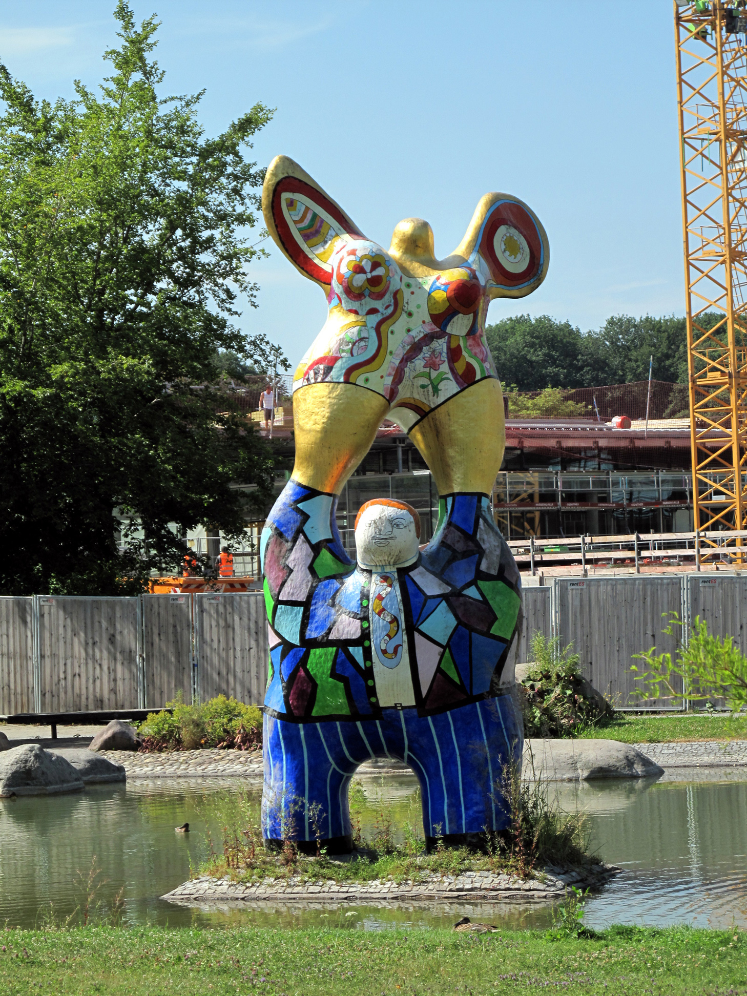 Niki de Saint Phalle, Le poète et sa muse, 1976-78, - Kunstpfad Universität Ulm, Baden-Württemberg, Deutschland